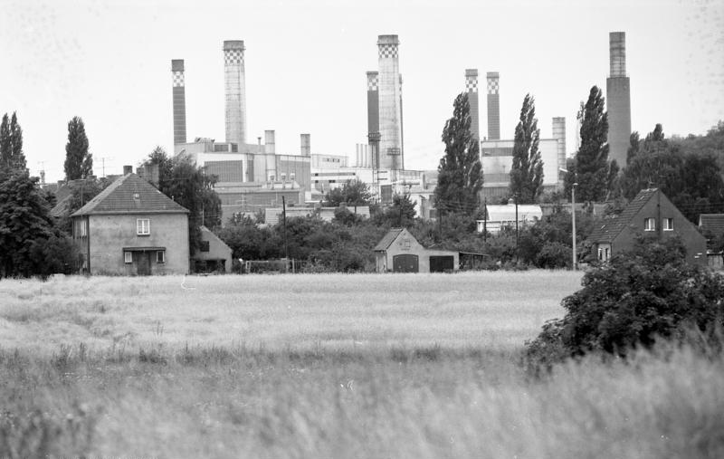 11.-18.8.1991 Bundesland Sachsen-Anhalt bei Gröbern: Kraftwerk Zschornewitz